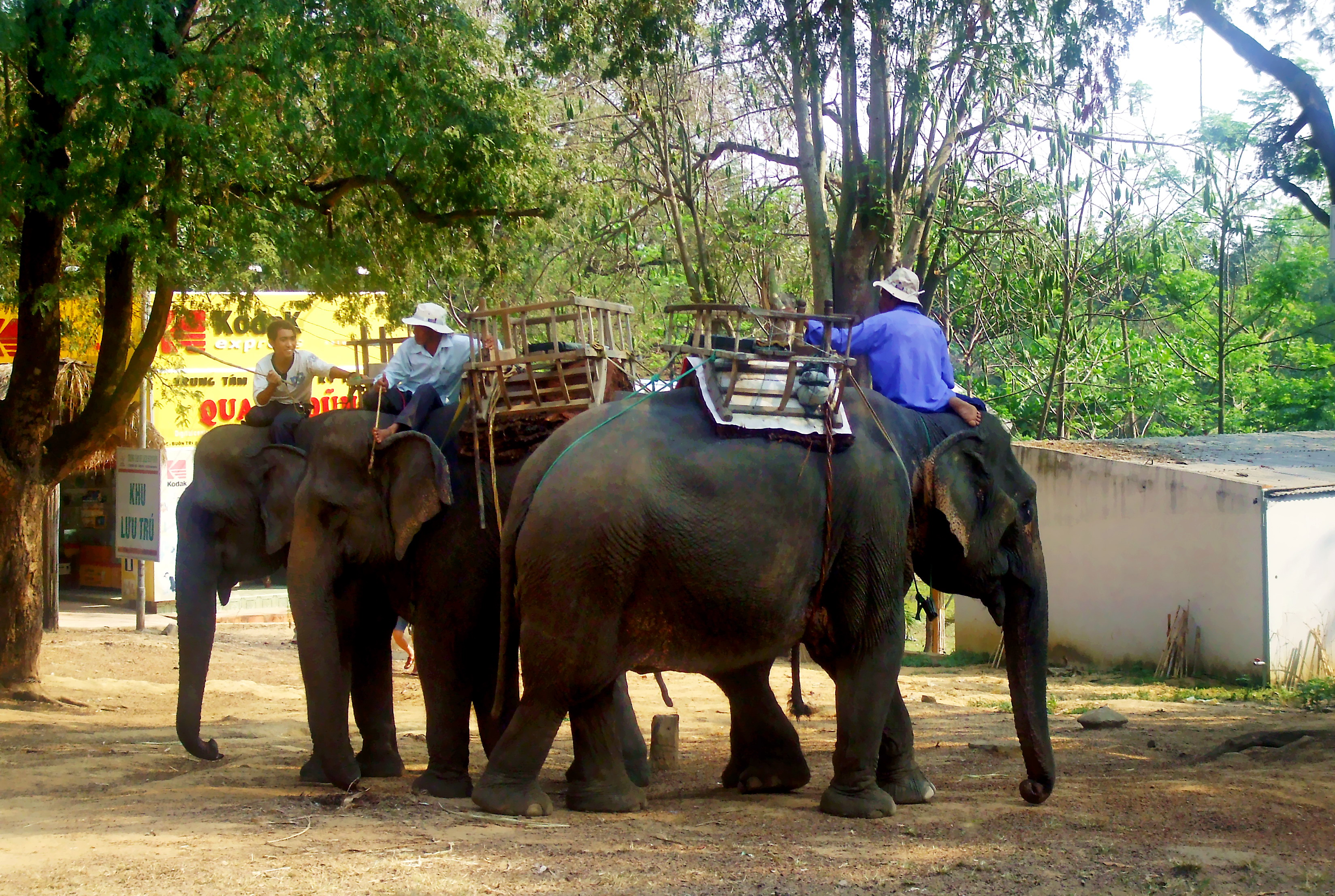 Voi ở Bản Đôn (thuộc Đắk Lắk, Việt Nam), dùng để đưa du khách đi tham quan.